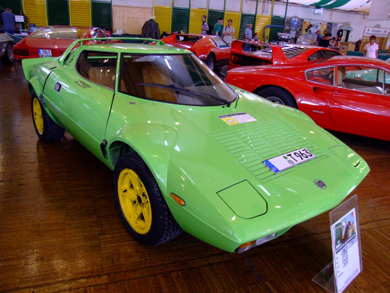 Lancia Stratos HF 2400 ccm 195 PS 1978